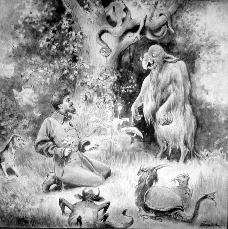 Illustration of the Russian fairy tale "The Scarlet Flower" ("Аленький цветочек"). Иллюстрация выполнена для альманаха "Волшебный фонарь"